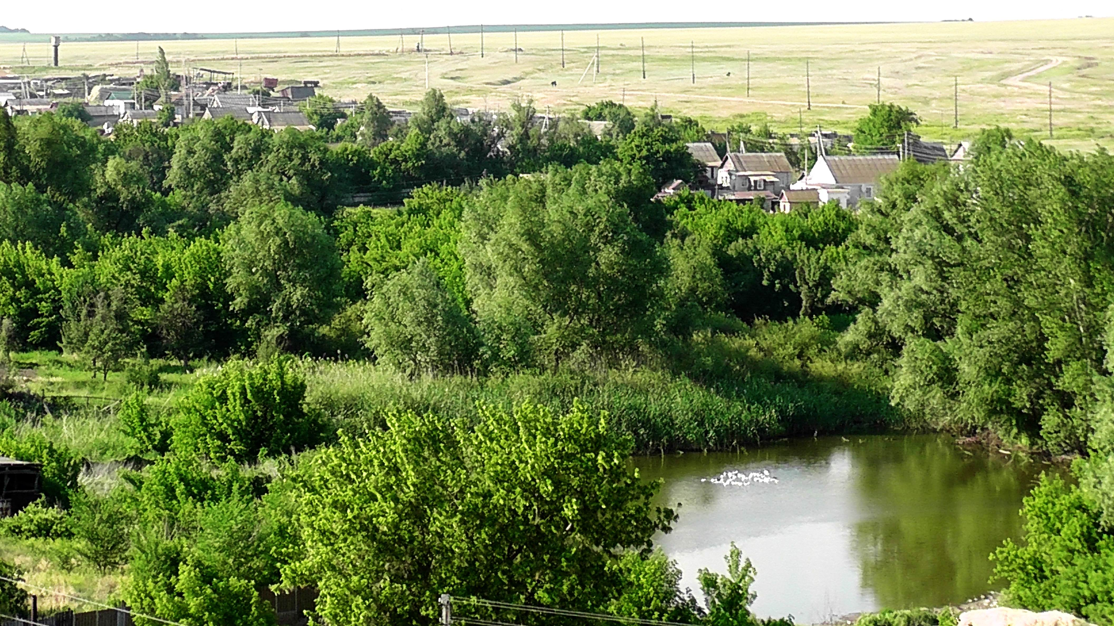 с. Лозное. Вид с колокольни